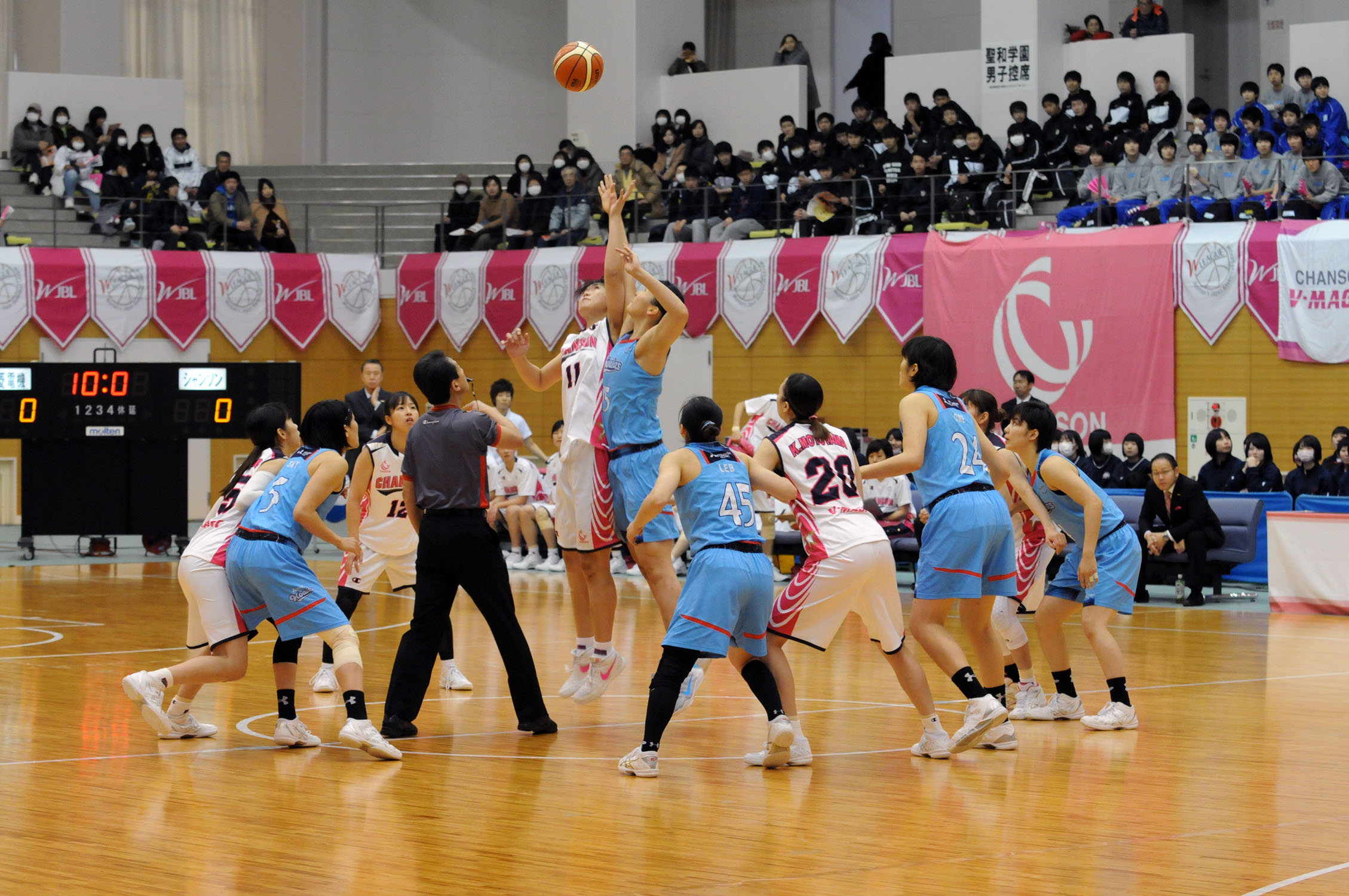 WJBL 16-17レギュラーリーグ、シャンソン対三菱電機。琴丘総合体育館。